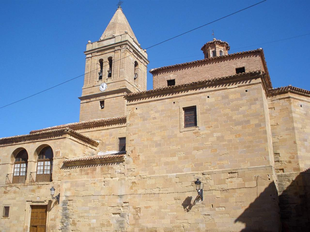 Church of San Martín, Alberite